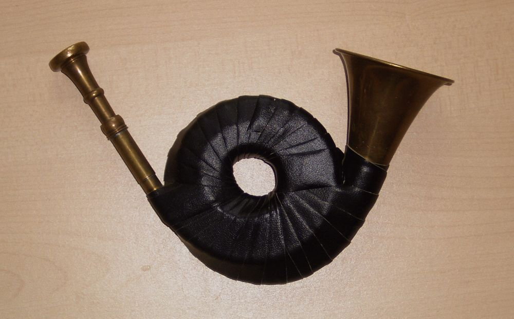 spezial Fürst-Pless-Horn